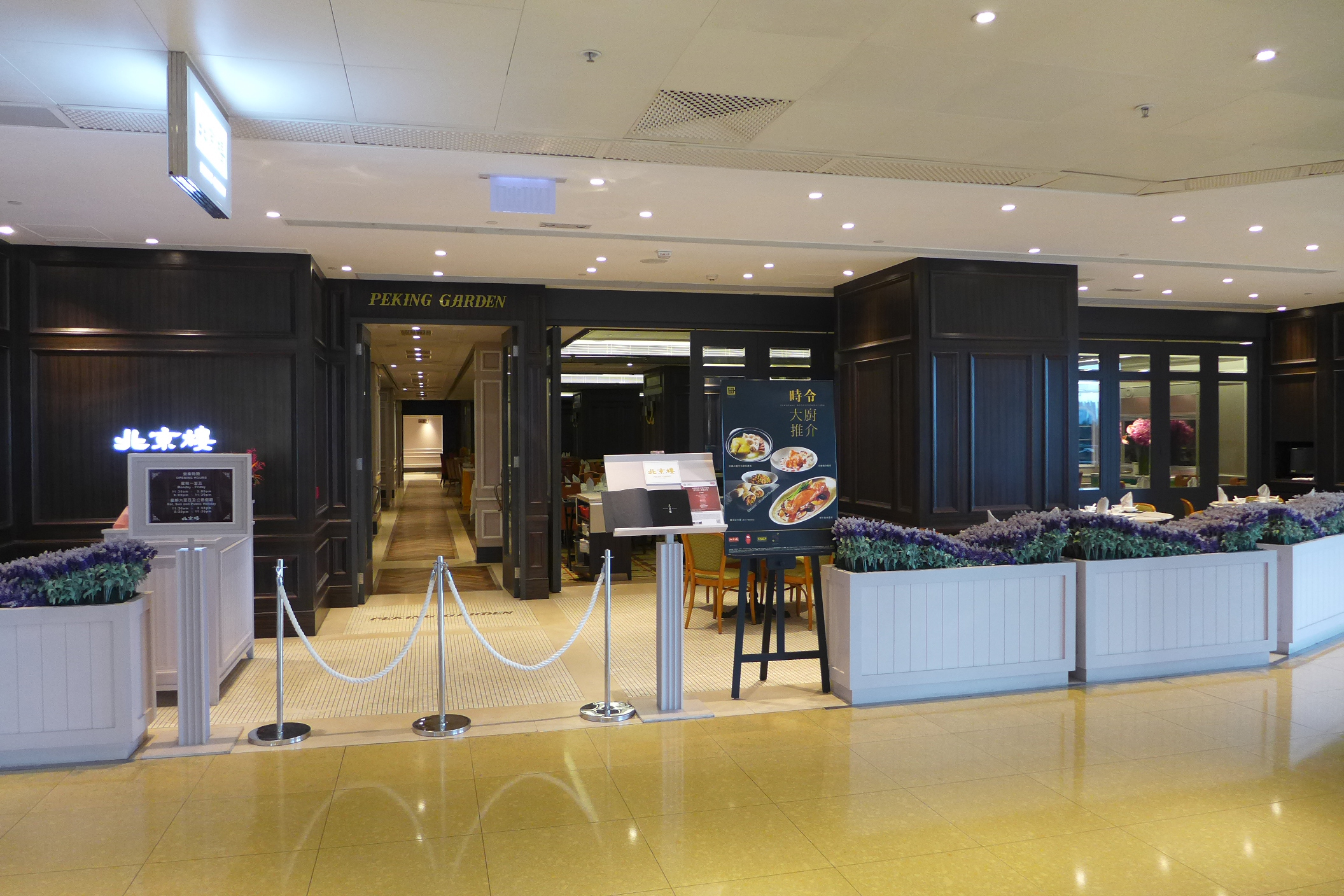 Peking Garden in Cityplaza